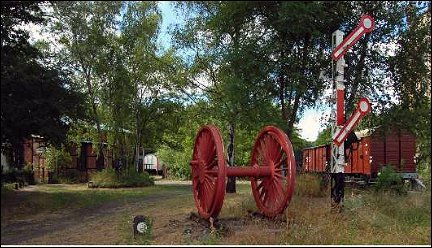 Site of the AG Märkische Kleinbahn